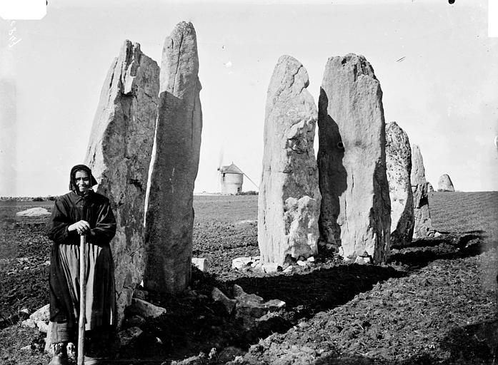 Alignement du Vieux Moulin à Plouharnel, photographié par Zacharie Le Rouzic.